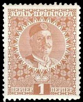 Почтовая марка Черногории из последней серии 1913 года